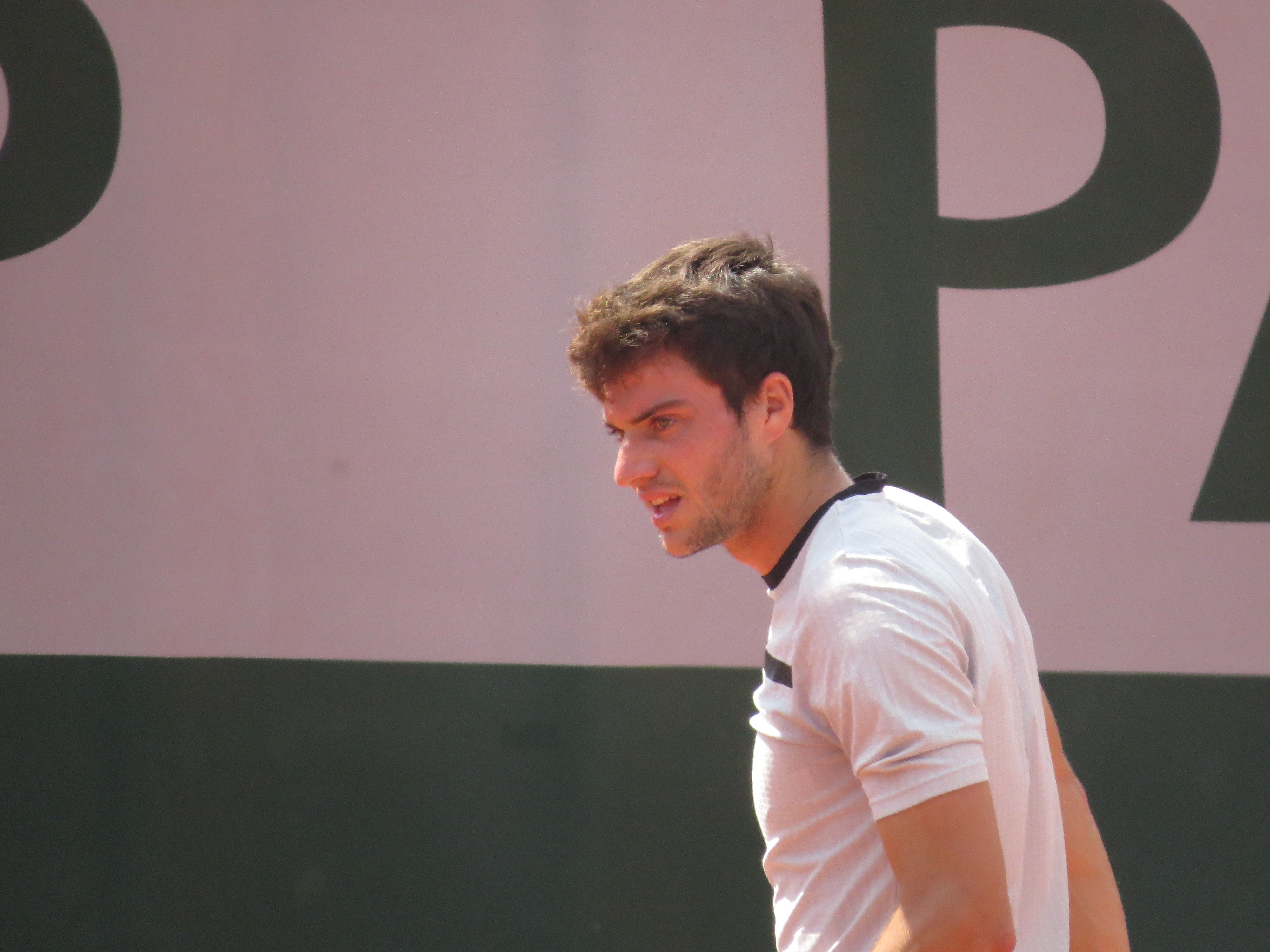 Pedro Martínez lors de son premier tour des qualifications.